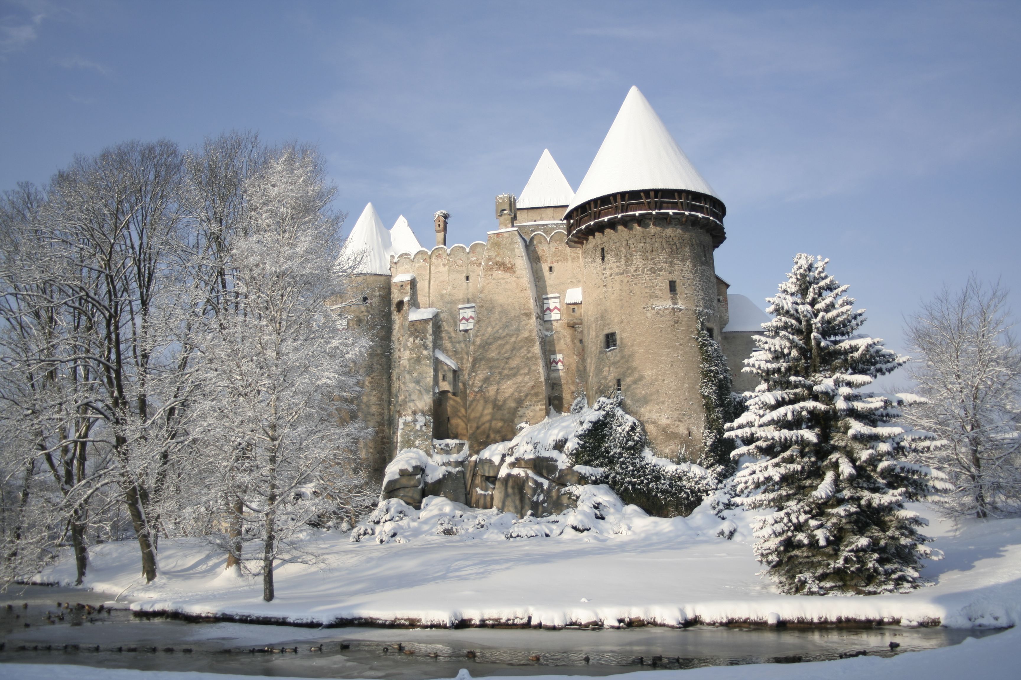 Wasserburg Heidenreichstein im Winter 2005